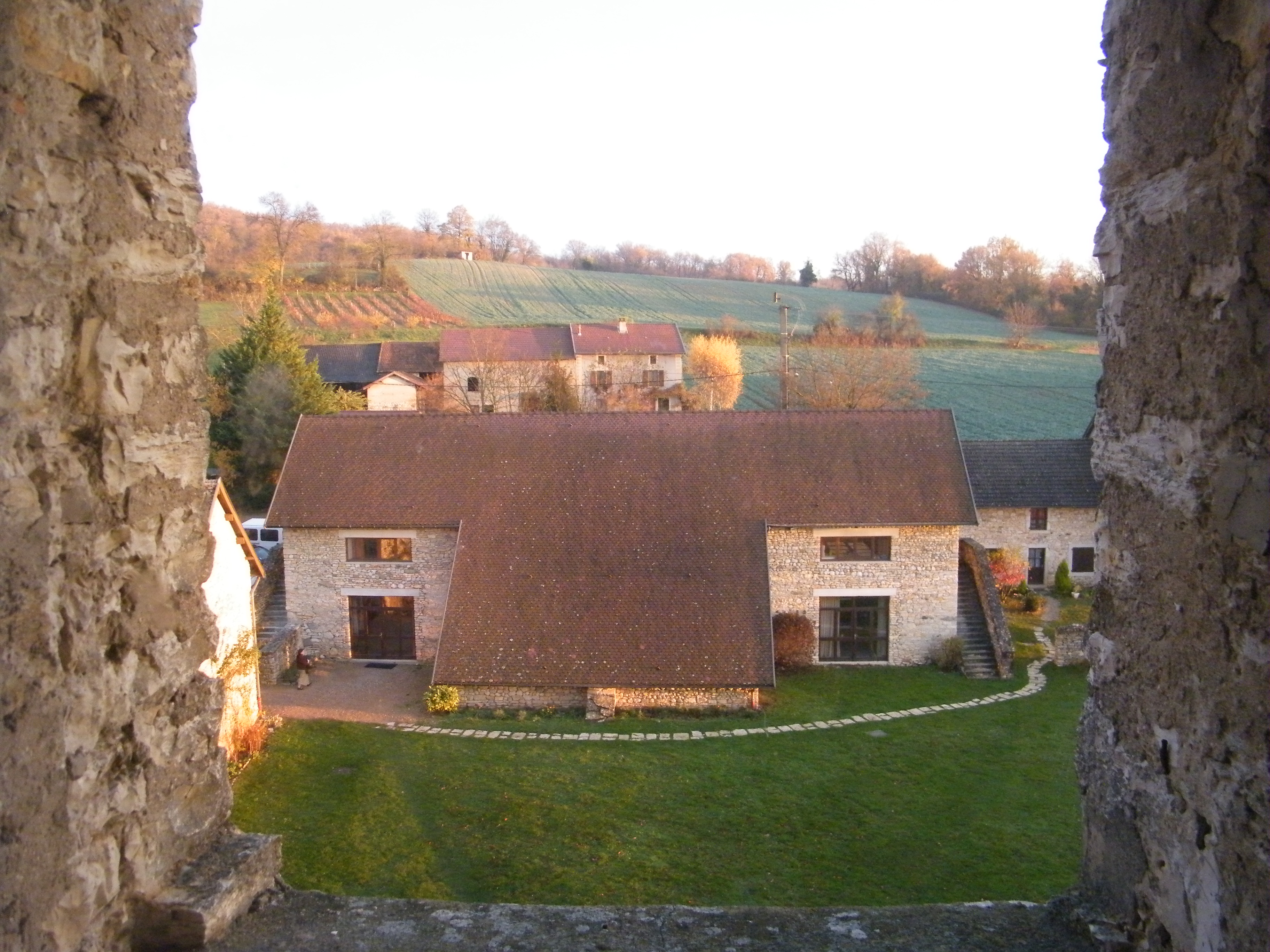 Chapelle (ancienne grange) de Montagnieu vue depuis la maison forte.